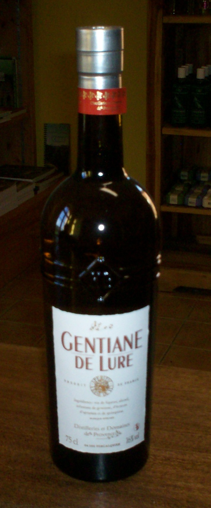 Gentiane de Lure (Alpes de Haute Provence)